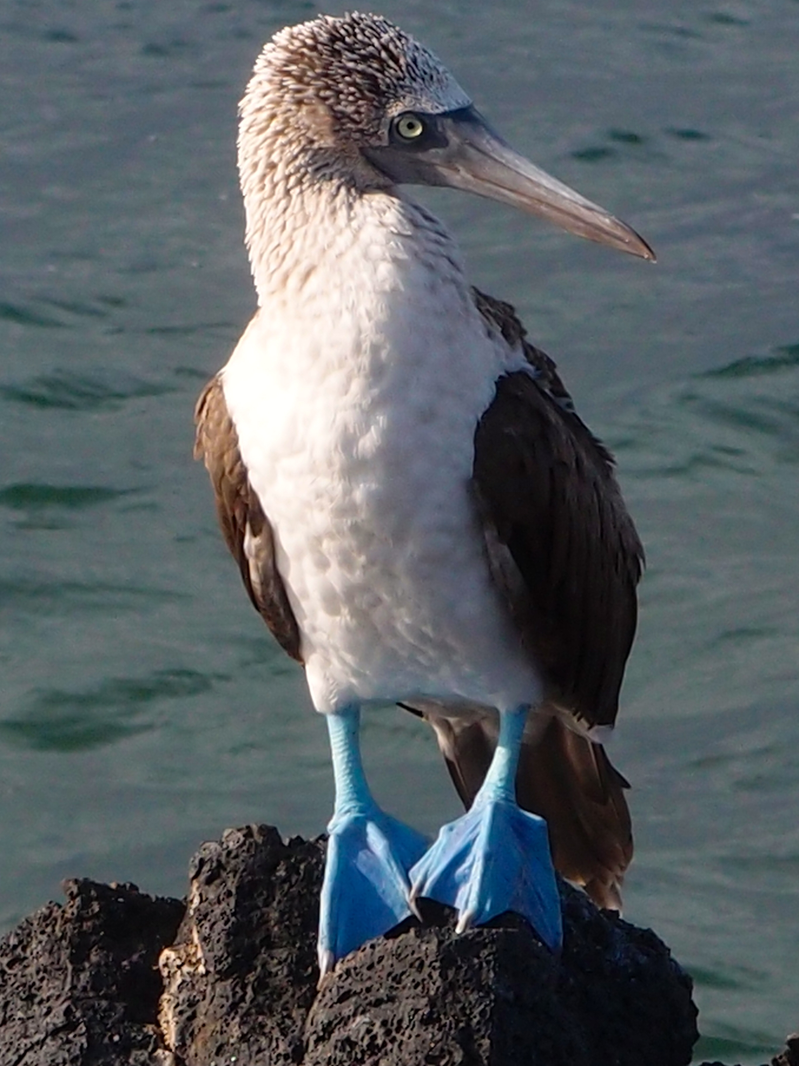 Blaufuß-Tölpel auf den Galapagosinseln